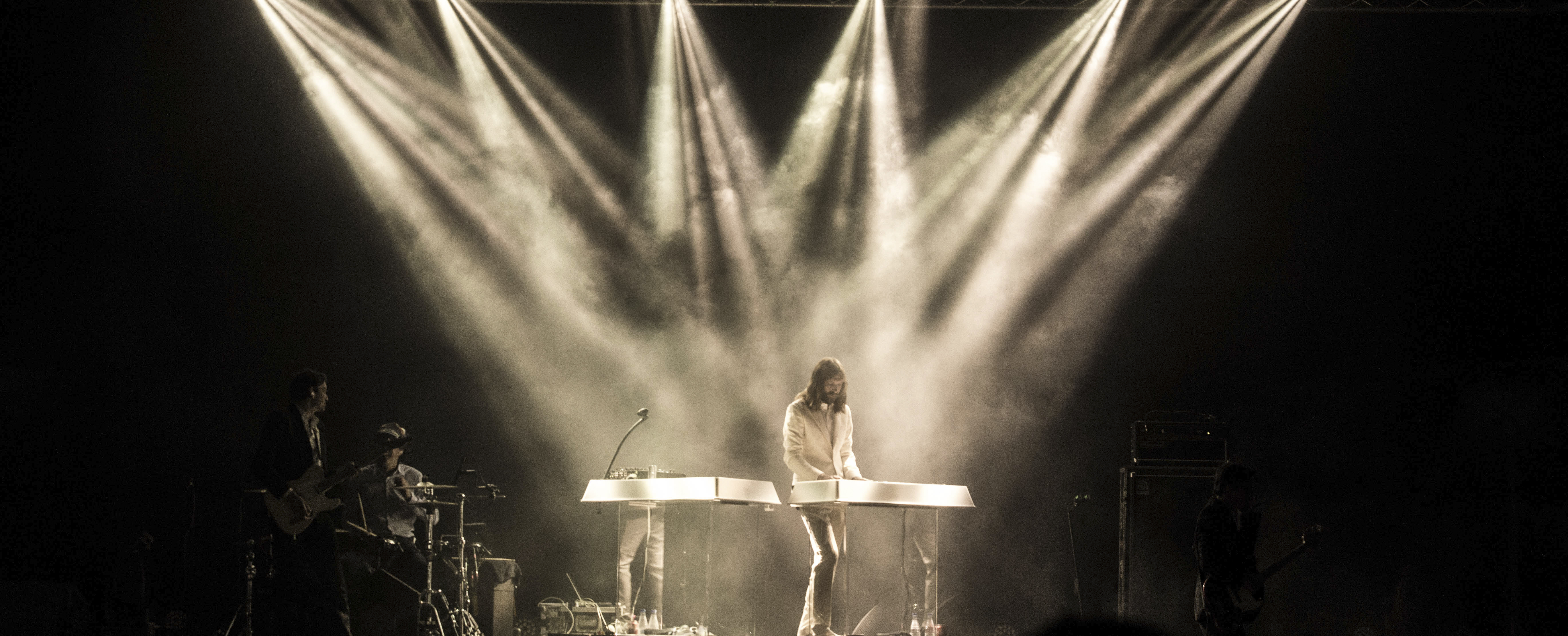 FIB 2016